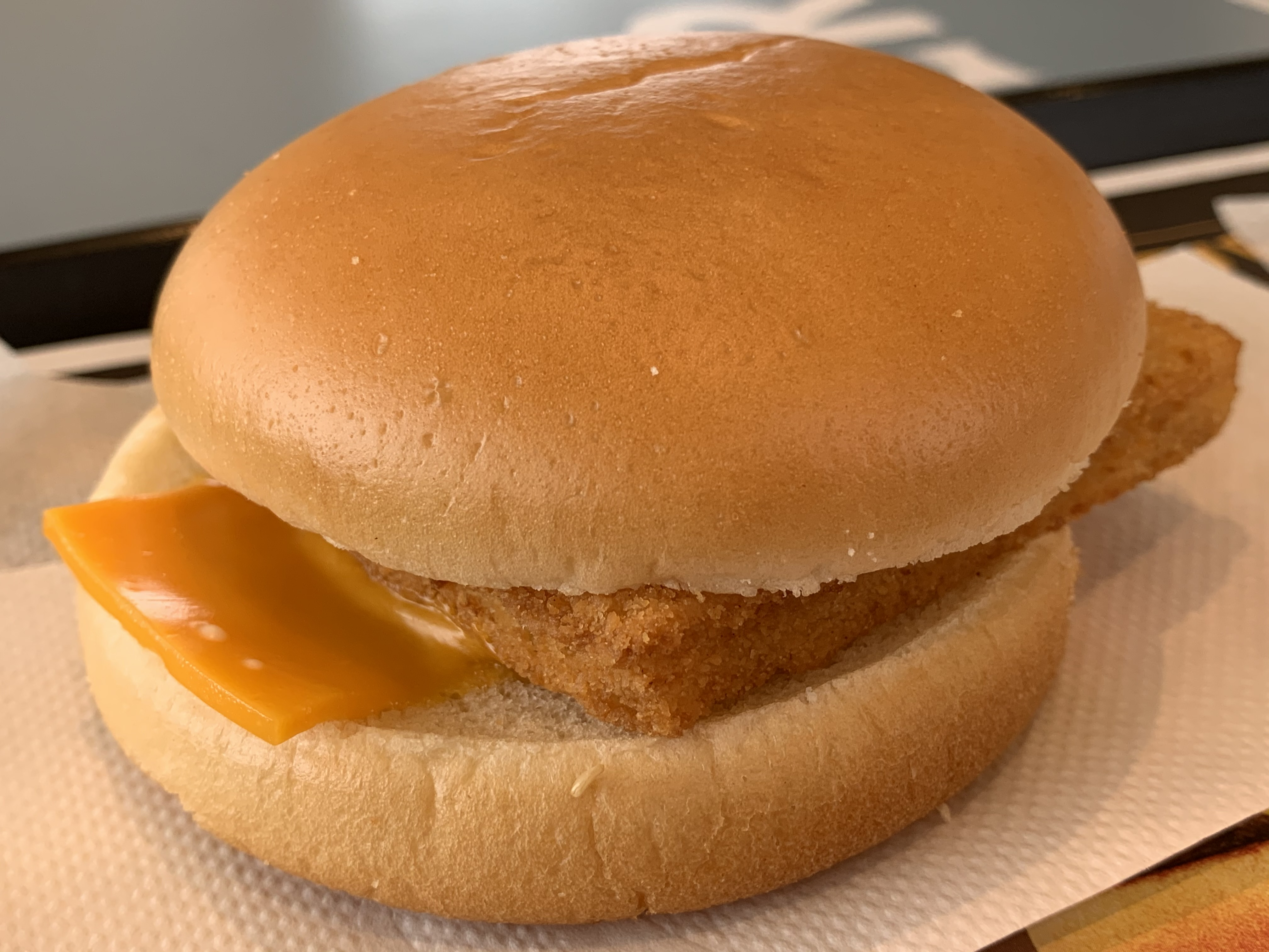 マクドナルドのフィレオフィッシュ